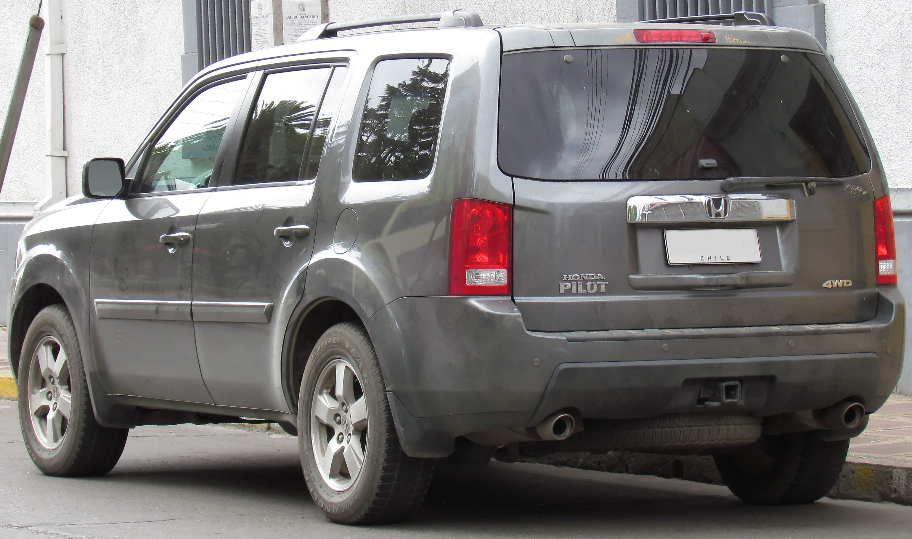 Honda Pilot EXL 2009